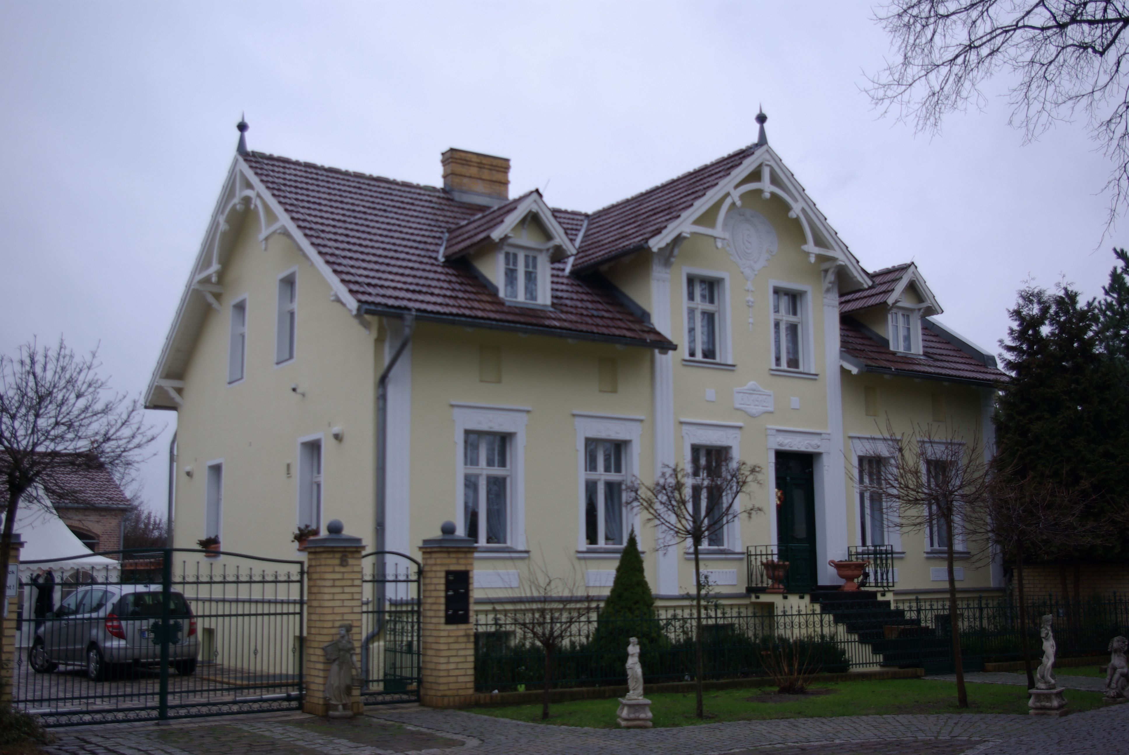 Mittenwalde Ortsteil Motzen in Brandenburg. Das Haus in der Kirchstraße 5 steht unter Denkmalschutz. Es steth gegenüber der Kirche.